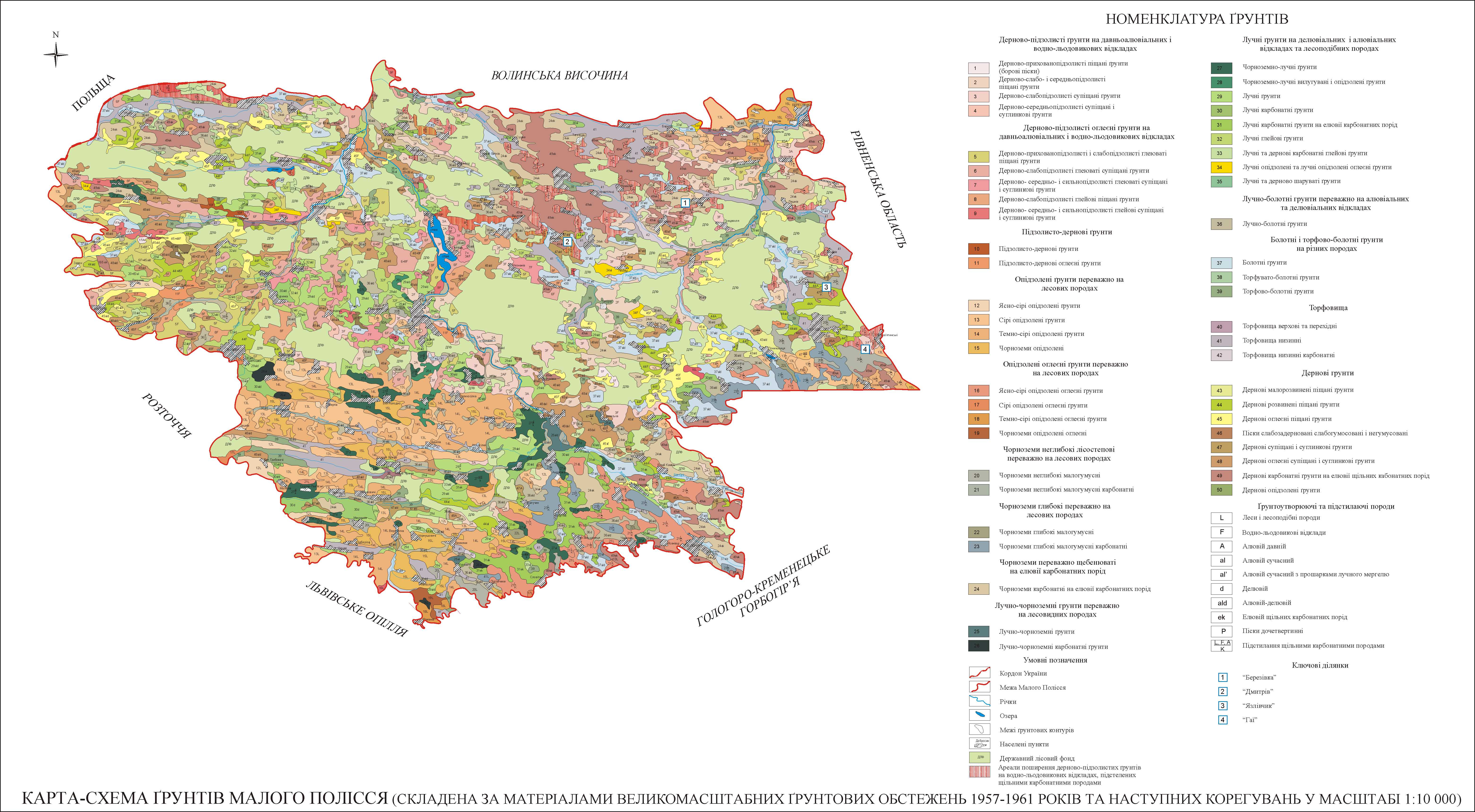 Карта-схема грунтів малого Поліся, Галичина, Україна